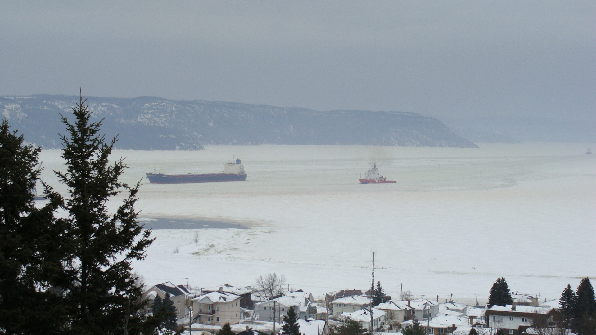 Bateaux à La Baie, au Saguenay (Québec, Canada). Vue de la Polyvalente de La Baie.Le NGCC Terry Fox ..IMO 8127799